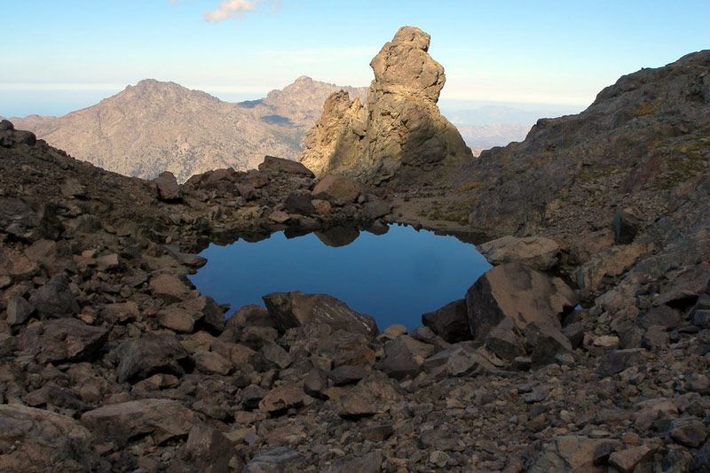 Le lac d'Argentu devant au fond la Stattoghja et le Monte Padru